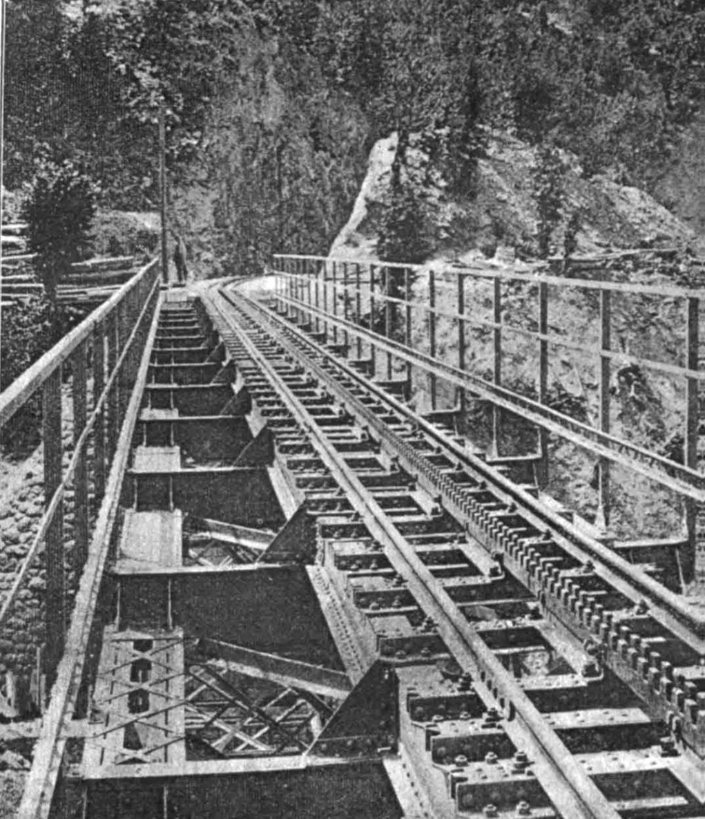 Zwischen den Stationen Brdjani und Bradina überquerte die Narantabahn die 57 Meter tiefe Lukaschlucht. Gleis in bosnischer Spurweite und Zahnstange System Abt auf der Luka-Brücke.